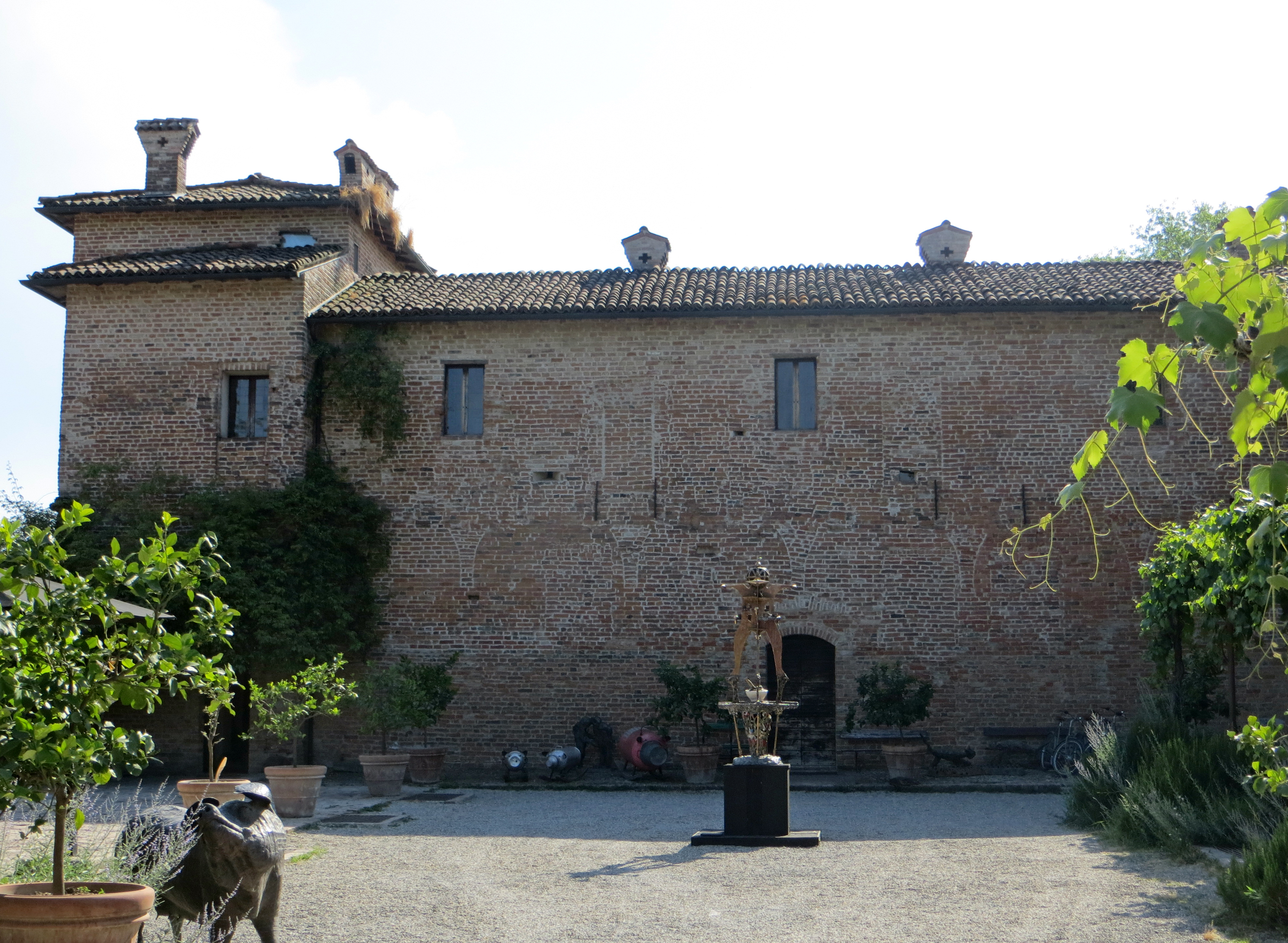 Antica Corte Pallavicina (Polesine Parmense) - corte